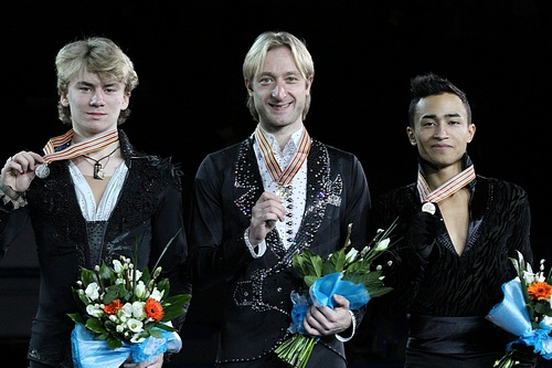 Подиум в мужском одиночном катании на чемпионате Европы по фигурному катанию 2012. Слева на право: Артур Гачинский (Россия, 2-е место), Евгений Плющенко (Россия, 1- место), Флоран Амодье (Франция, 3-е место)